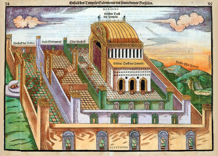 עיבוד למפת ירושלים שיצר היינריך בנטינג בשנת 1545